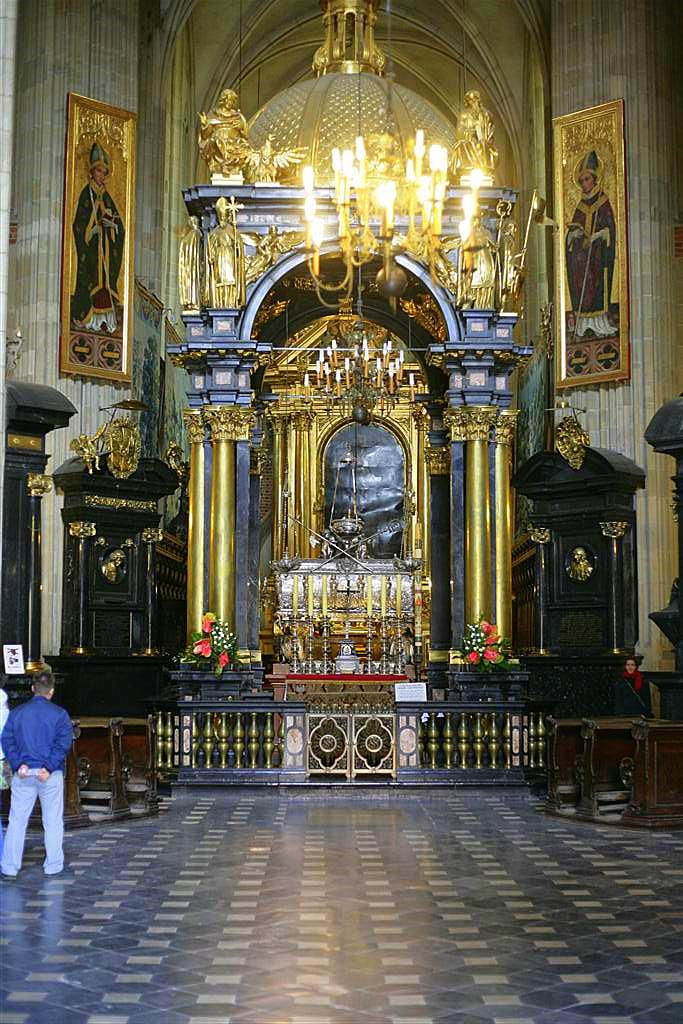 Sarkofag Św. Stanisława w Katedrze na Wawelu.